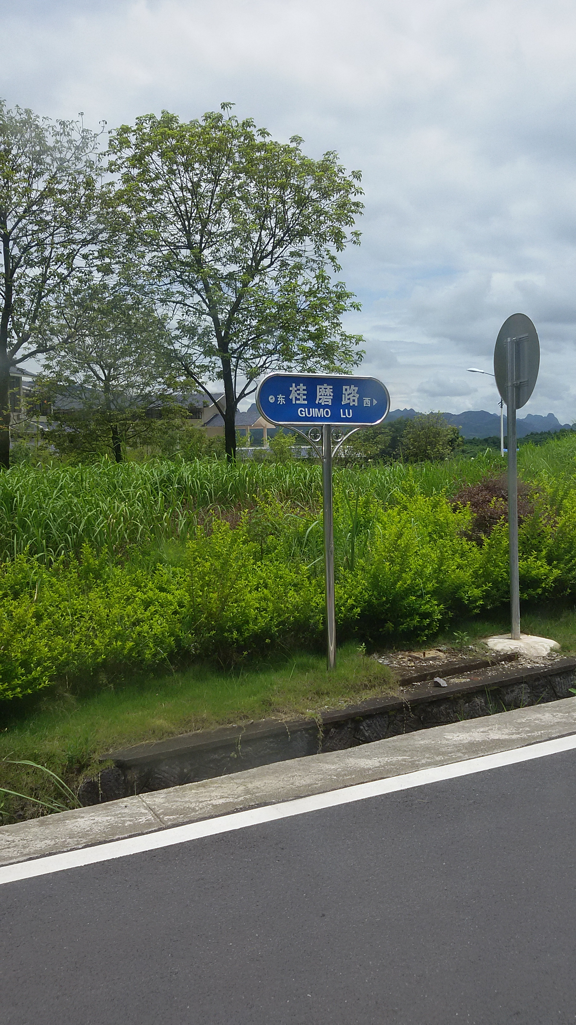 粵語: 桂林靈川縣桂磨路